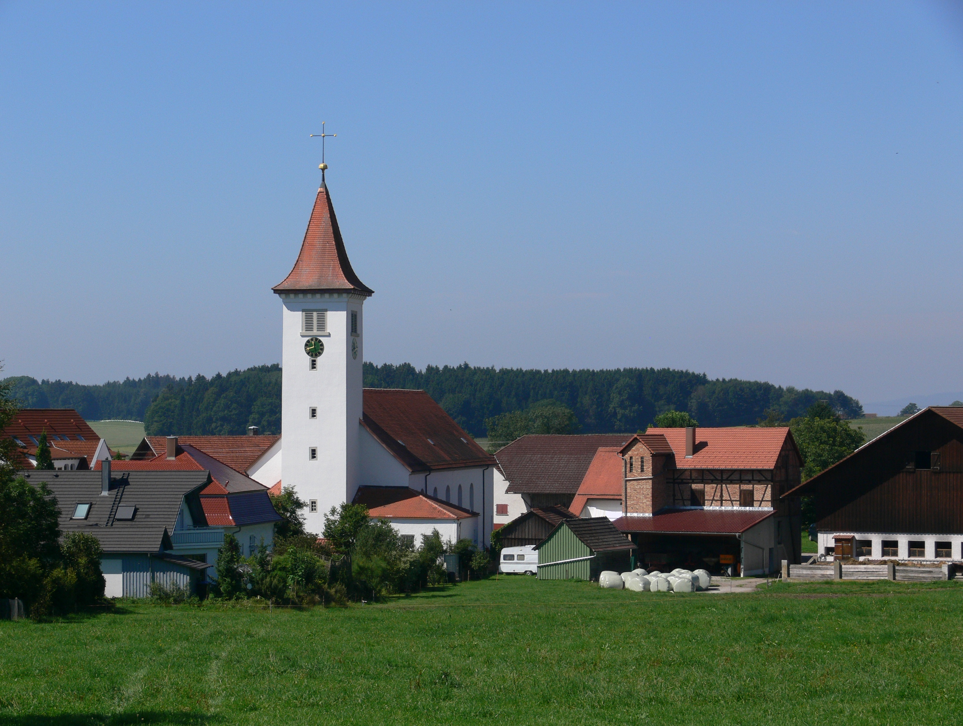 Schlier, Ansicht von Osten (von der Grund- und Hauptschule aus), mit Pfarrkirche St. Martin